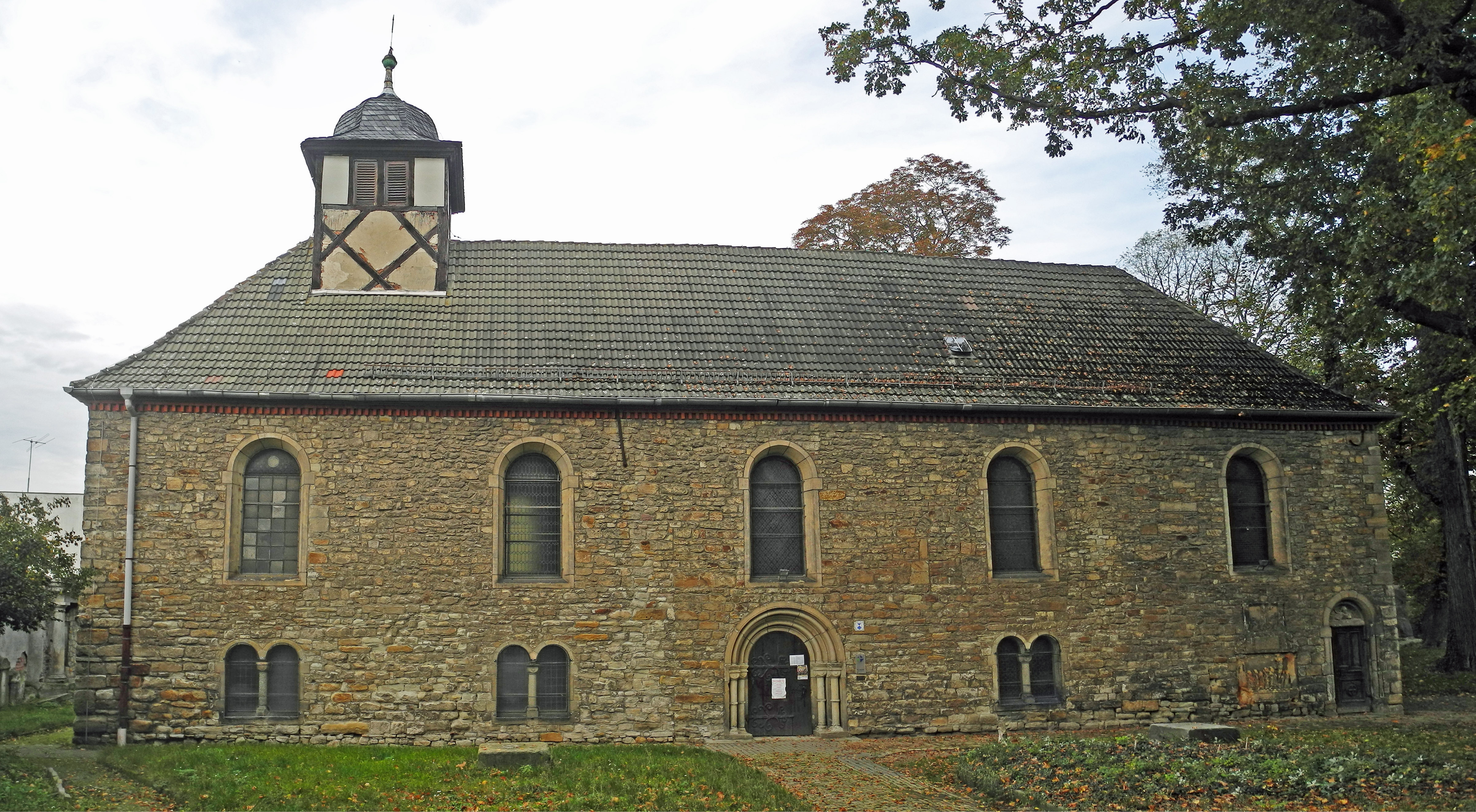 Die alte Laurentiuskirche in Calbe (Saale), Großer Lorenz / Kirchgasse, siehe [1].